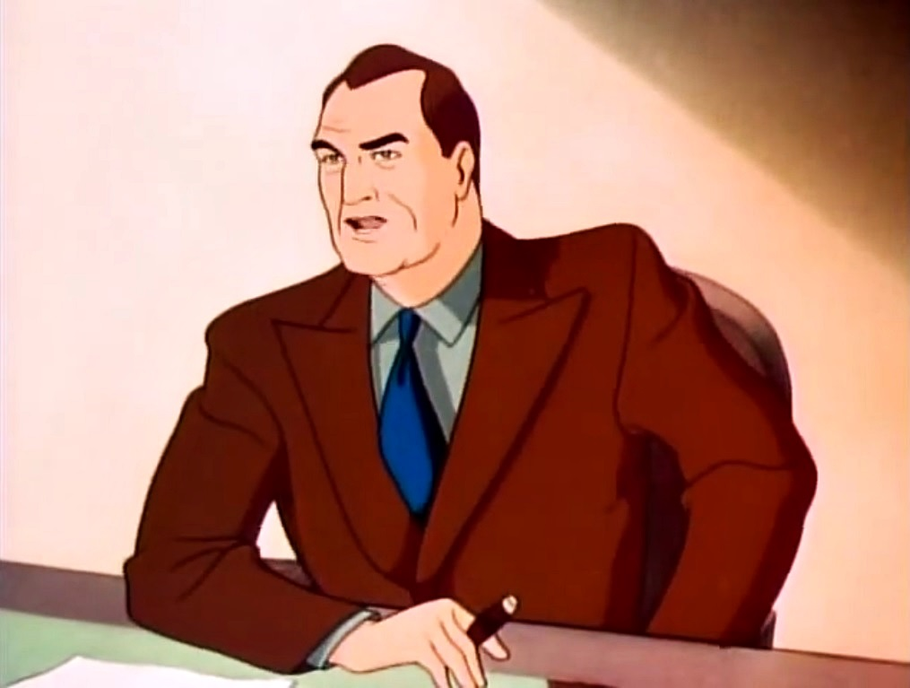 Imagen de la película El terremoto eléctrico que muestra al editor del Daily Planet, Perry White.